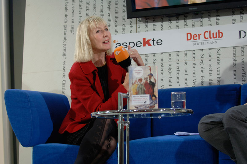 Brigitte Kronauer bei der Vorstellung ihres Buches Verlangen nach Musik und Gebirge, auf dem Blauen Sofa während der Frankfurter Buchmesse 2005.